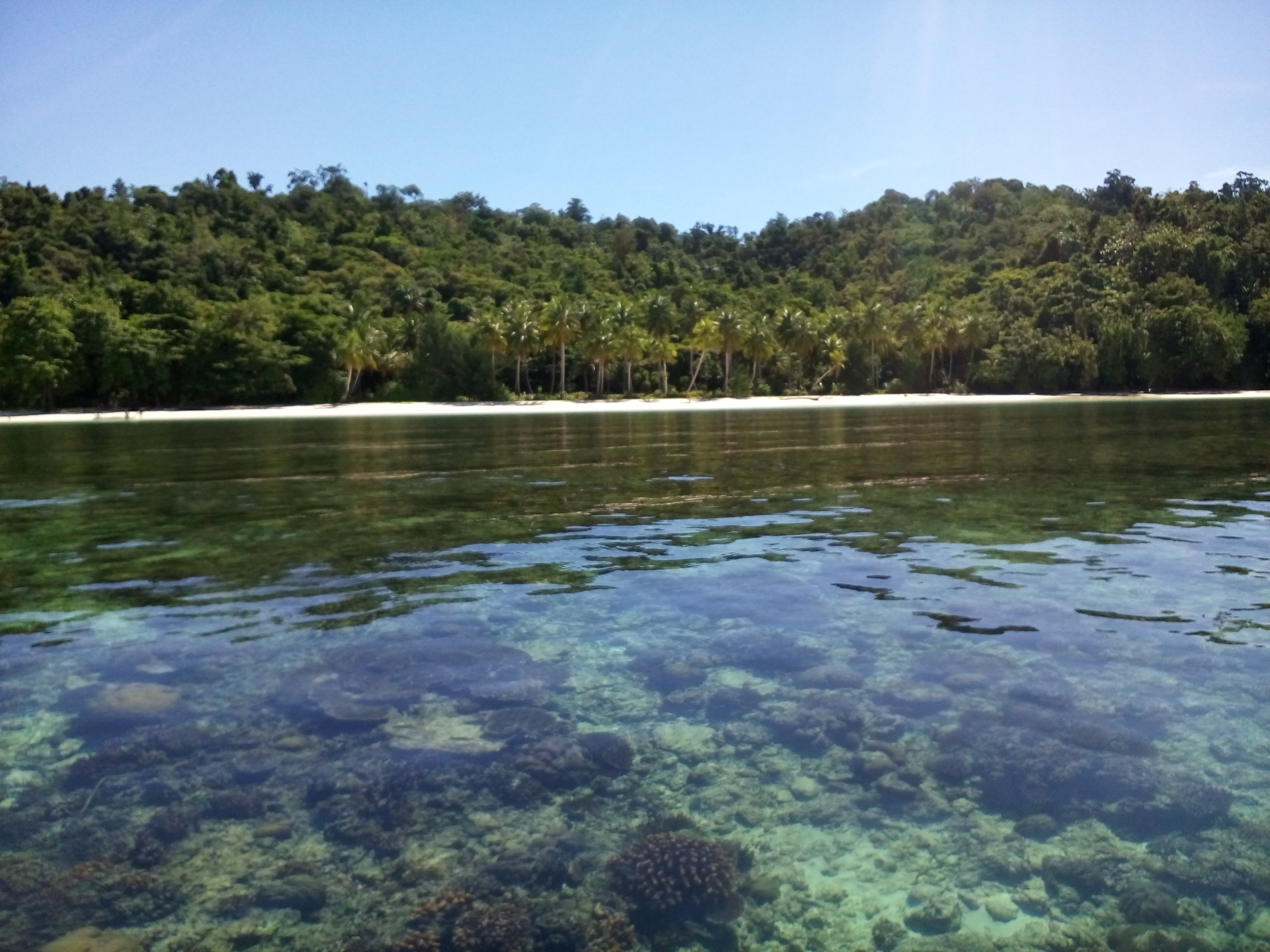 Terumbu Karang di Perairan Pantai Wayob Fakfak (doc.Aldi Bimantara)